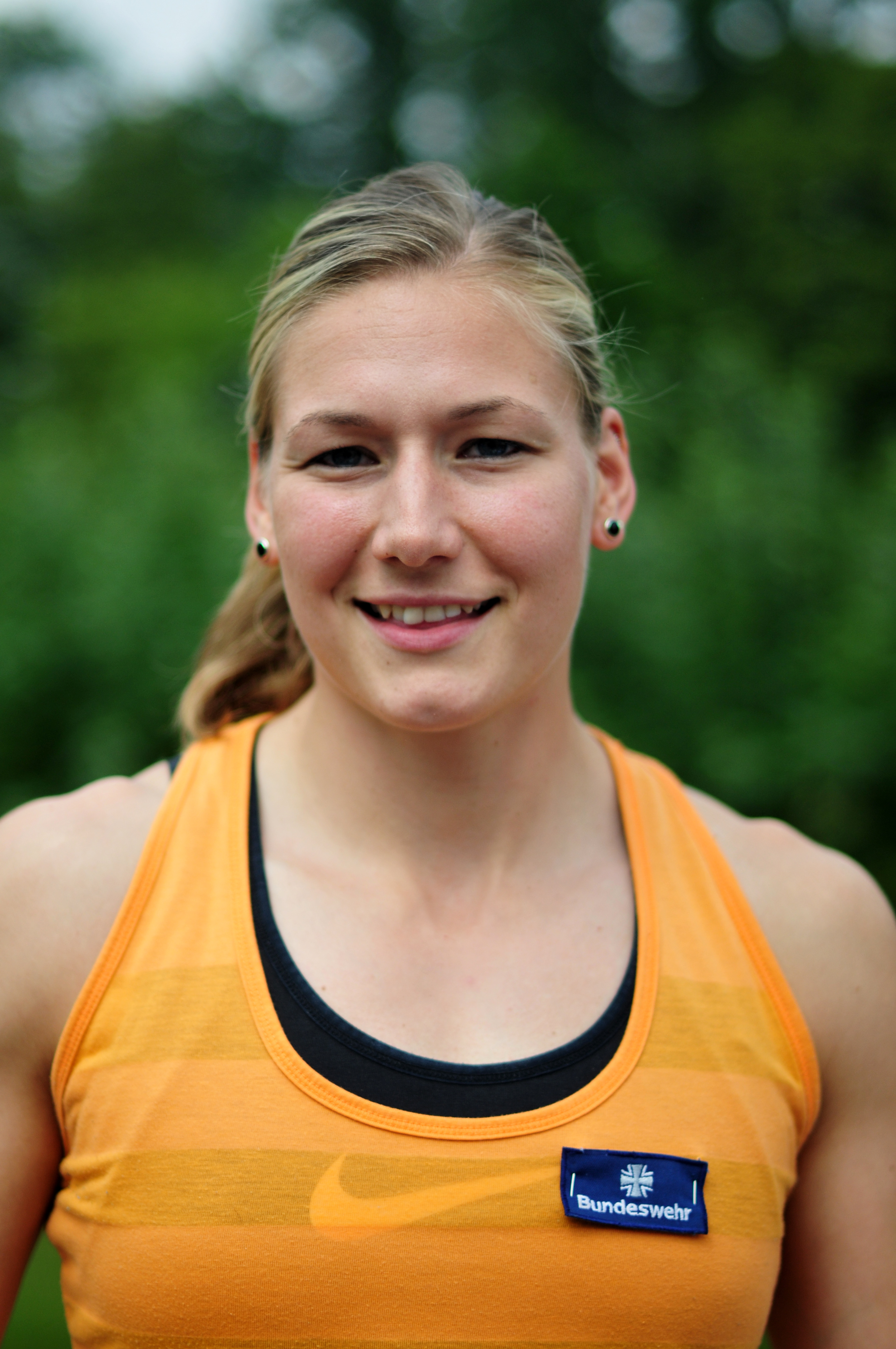 Pressetermin Olympiamannschaft in Kienbaum: Josephine Terlecki